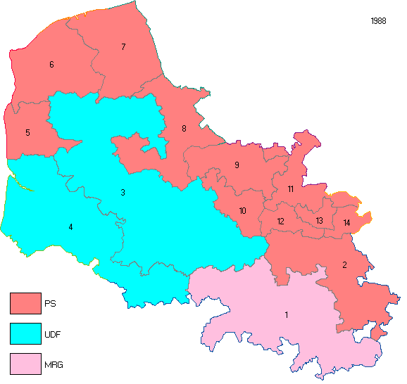 Pas-de-Calais en 1988.